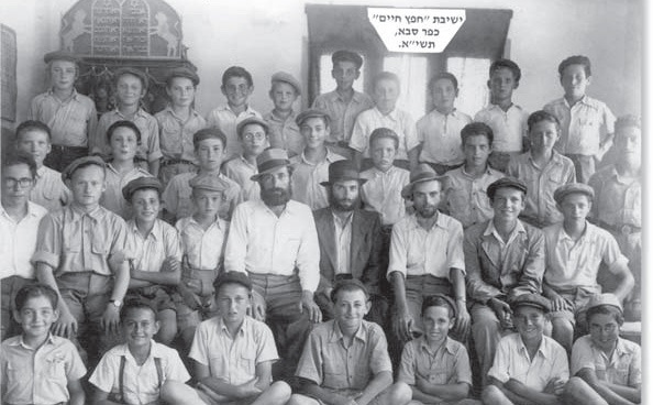 תמונת מחזור ישיבת כפר סבא במרכז ראש הישיבה הרב שטיינמן